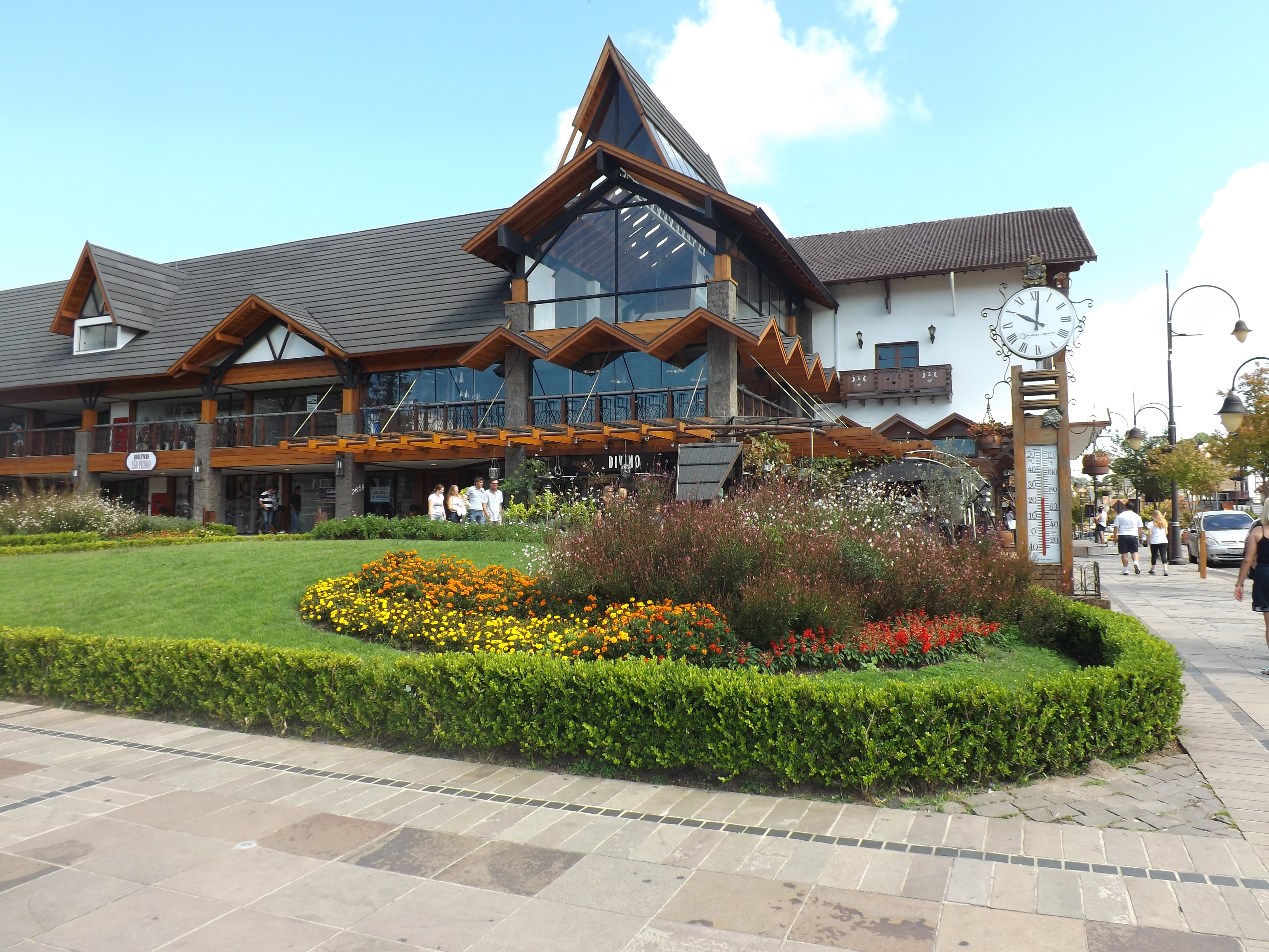 Gramado